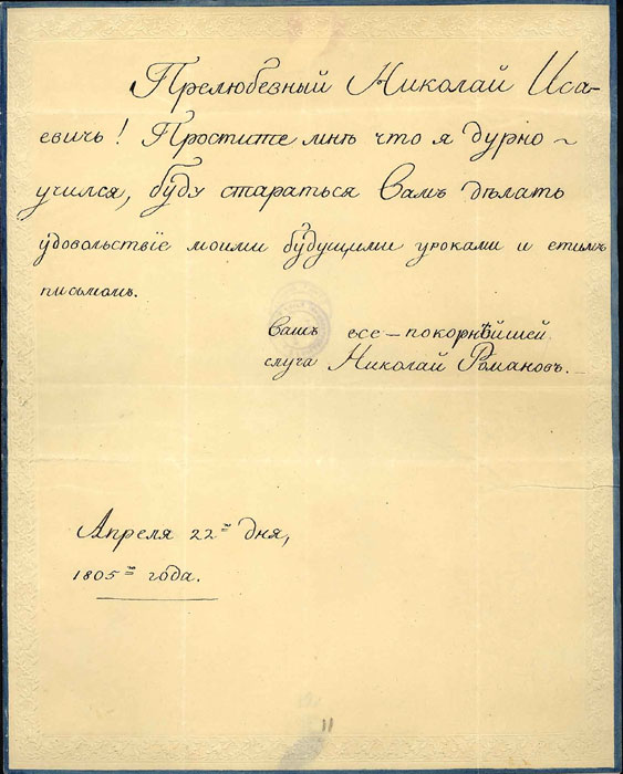 Письмо великого князя Николая Павловича своему воспитателю Н. И. Ахвердову от 22.04.1805